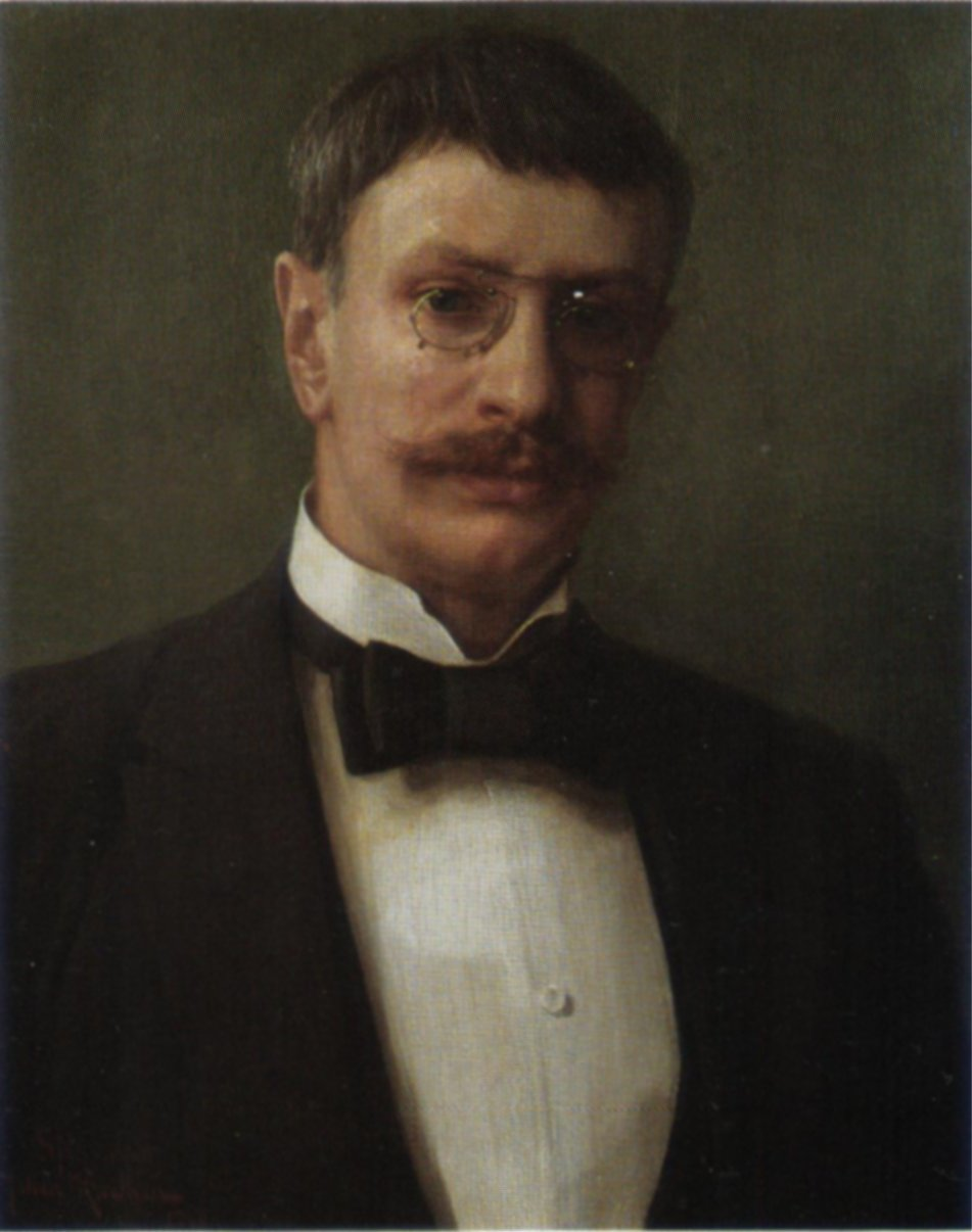 Self-portrait